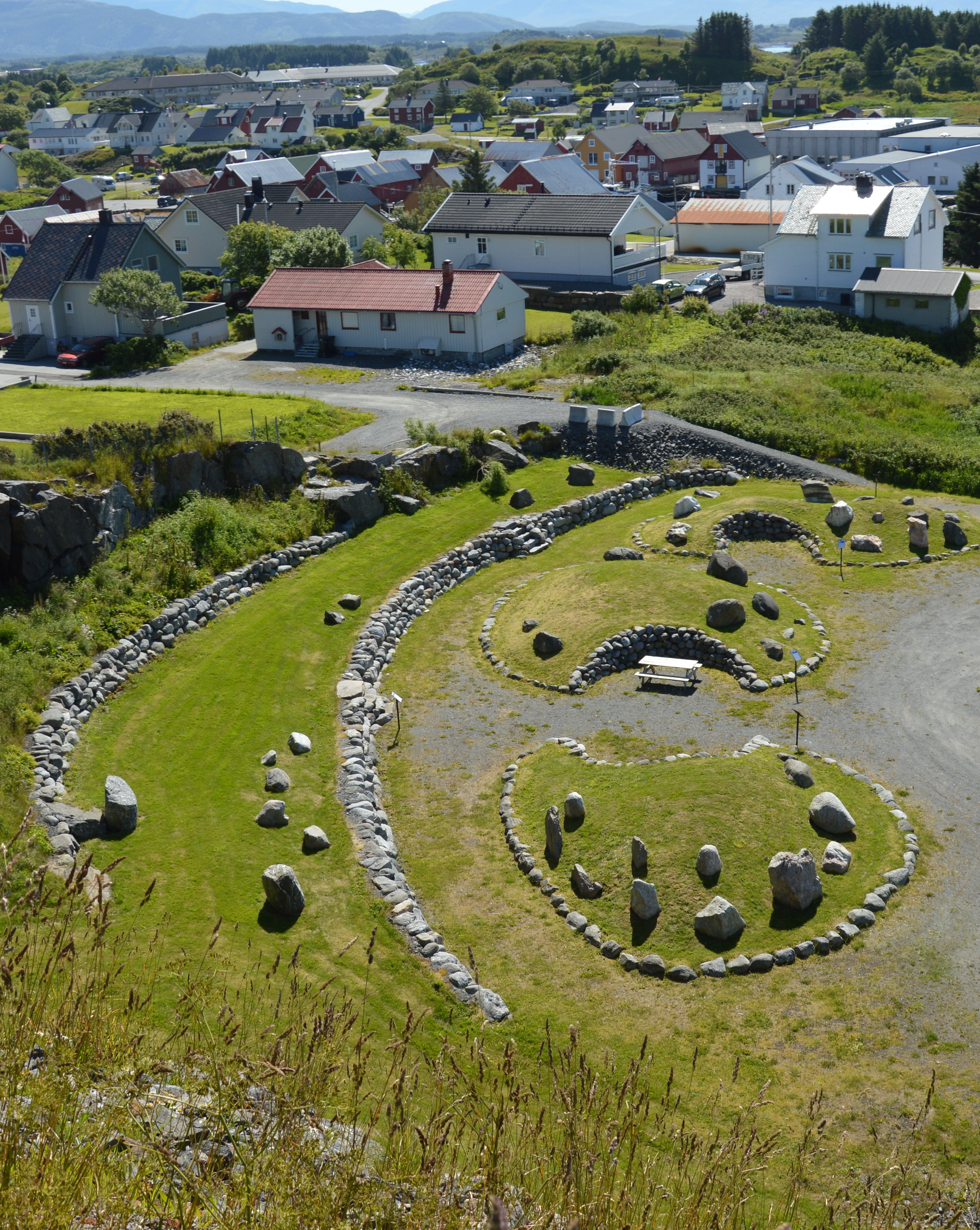 Steinpark bei Bud